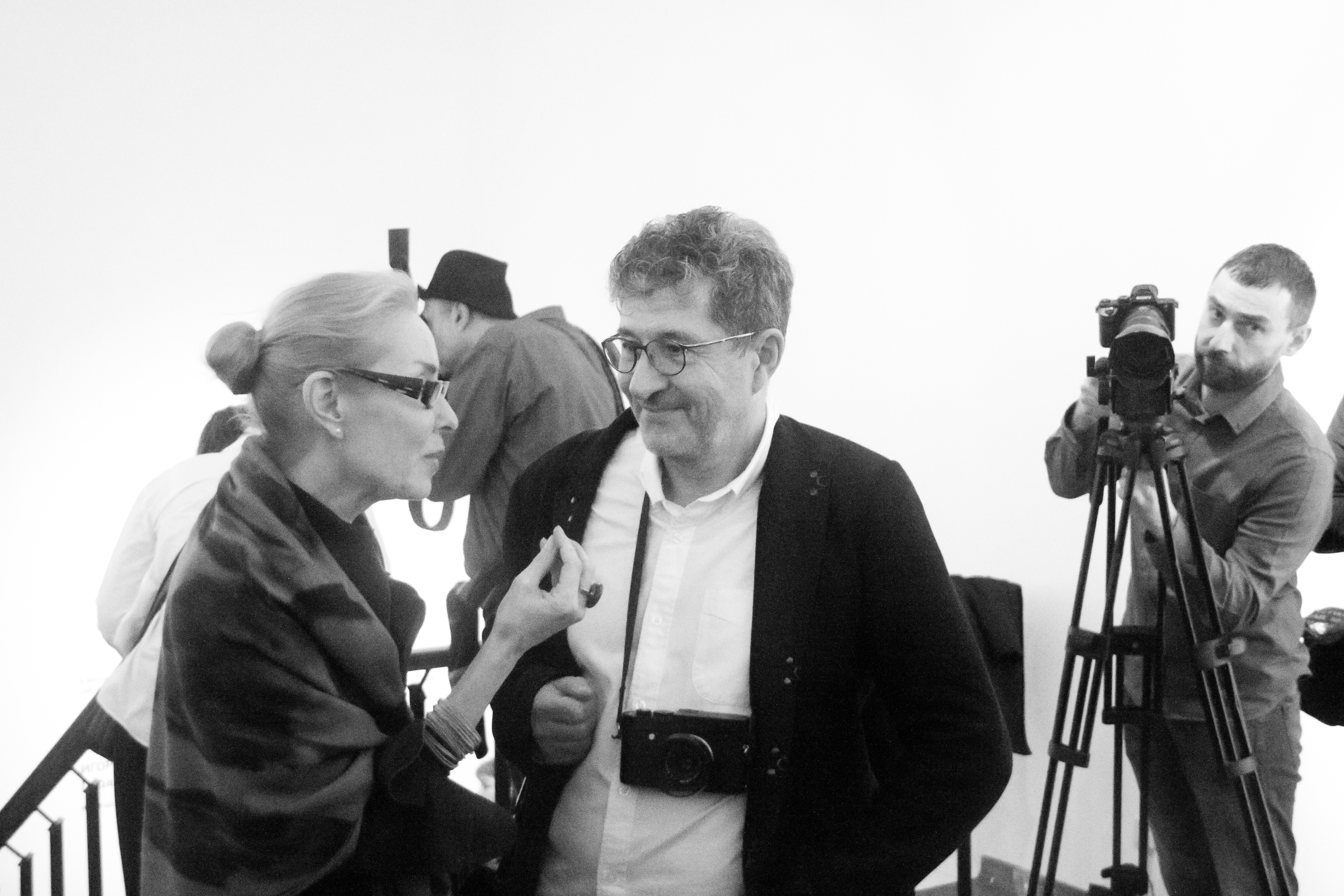 Ольга Свиблова и фотограф Игорь Верещагин